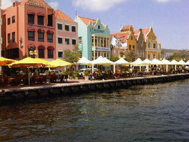 Curaçao